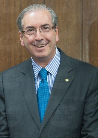 O presidente da Câmara dos Deputados Eduardo Cunha em 7 de maio de 2015.